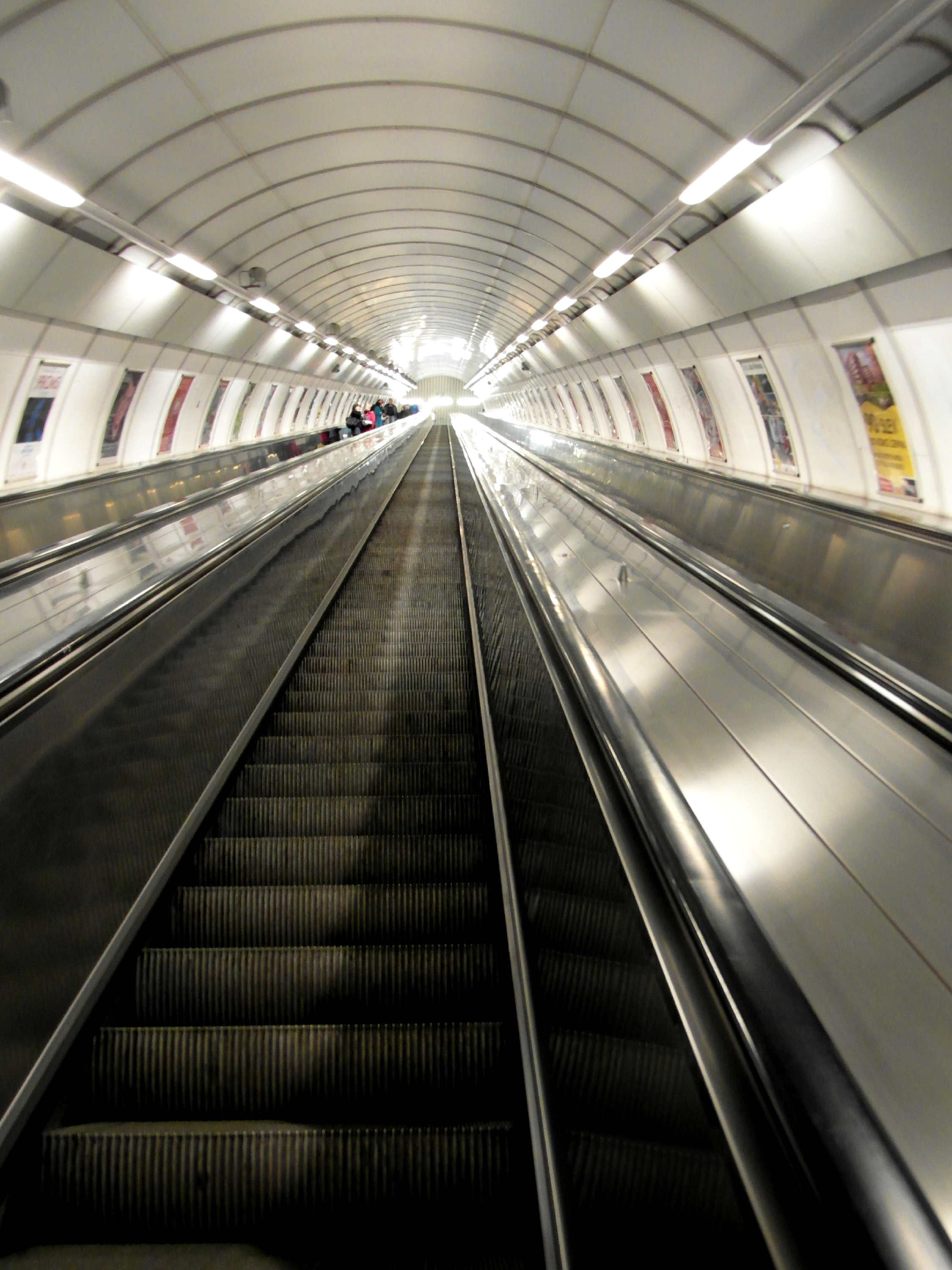 Praha - Metro - Náměstí Míru